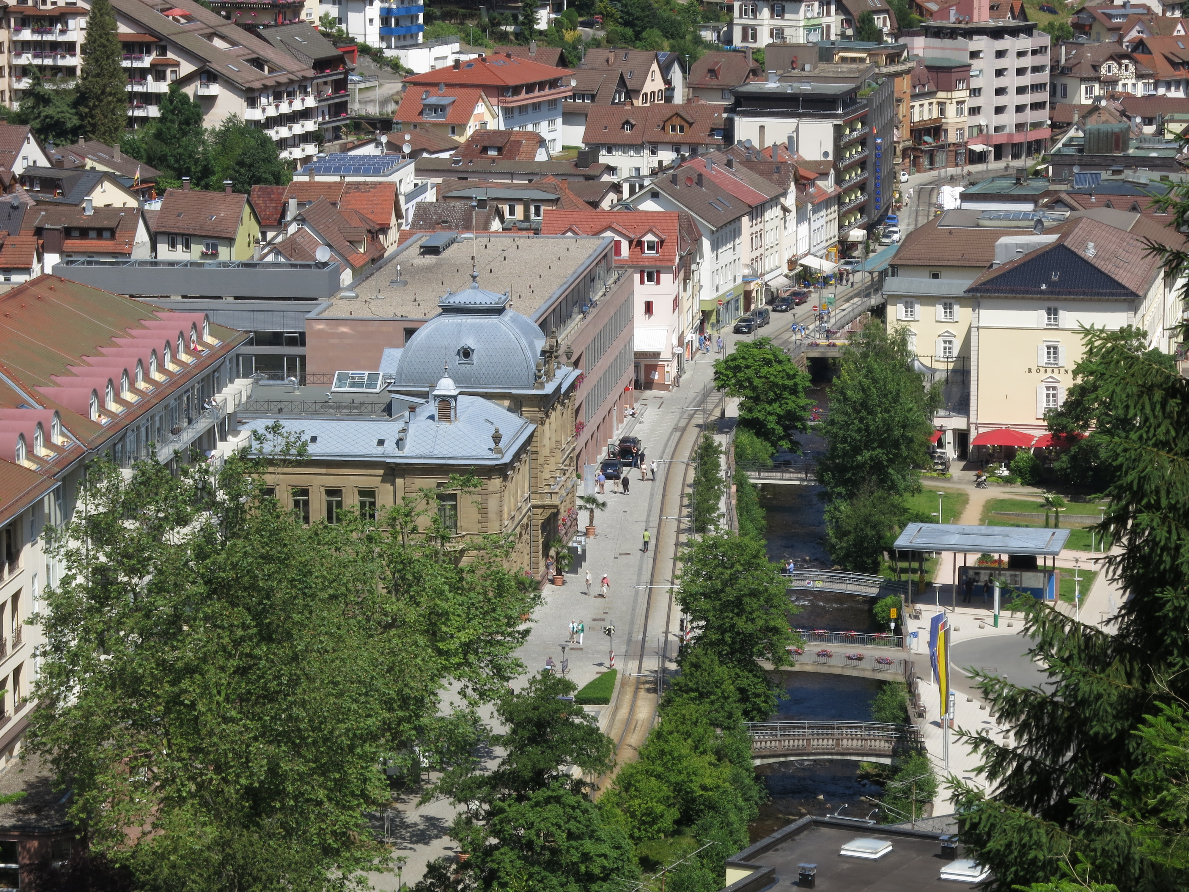 Innenstadt Bad Wildbad mit König-Karls-Bad und Sana-Klinik.